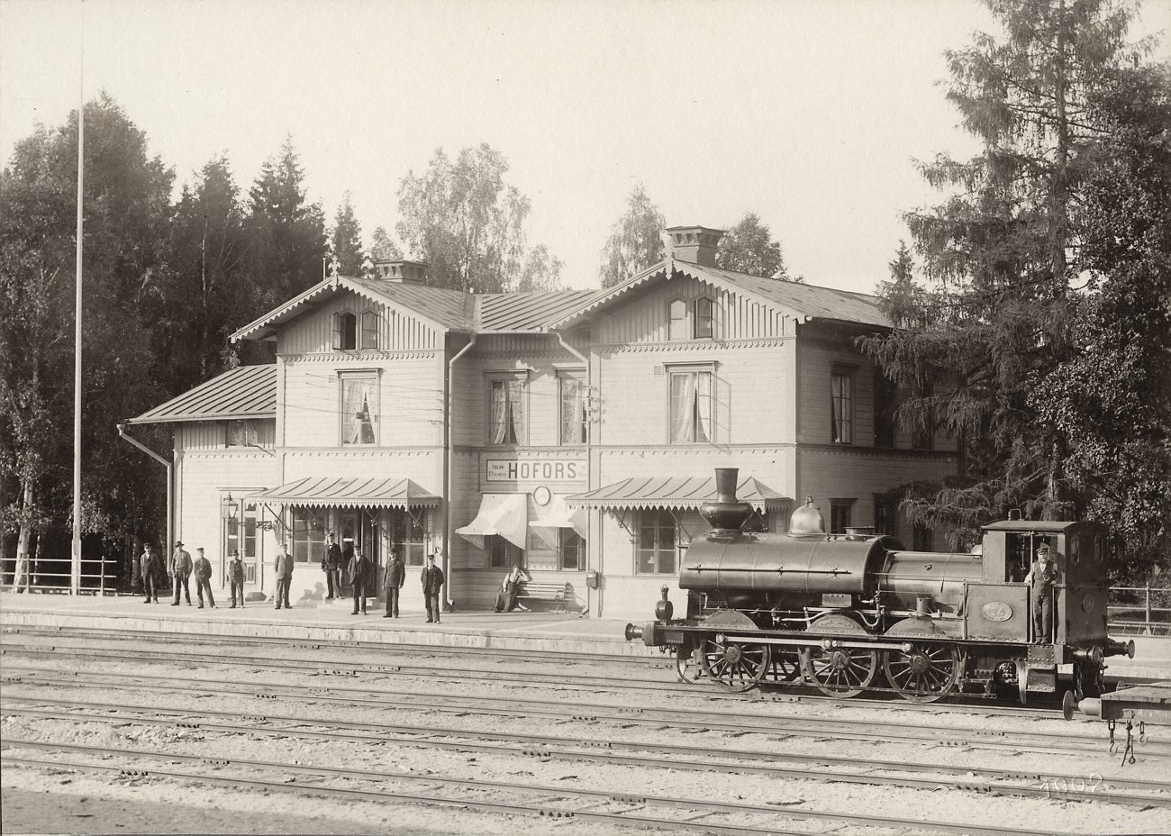 B4110. Stationsbyggnad i Hofors. Fotografiet var med i Svenska Turistföreningens pristävlan 1902. Bilden skänkt till Tekniska museet av Svenska Turistföreningen.